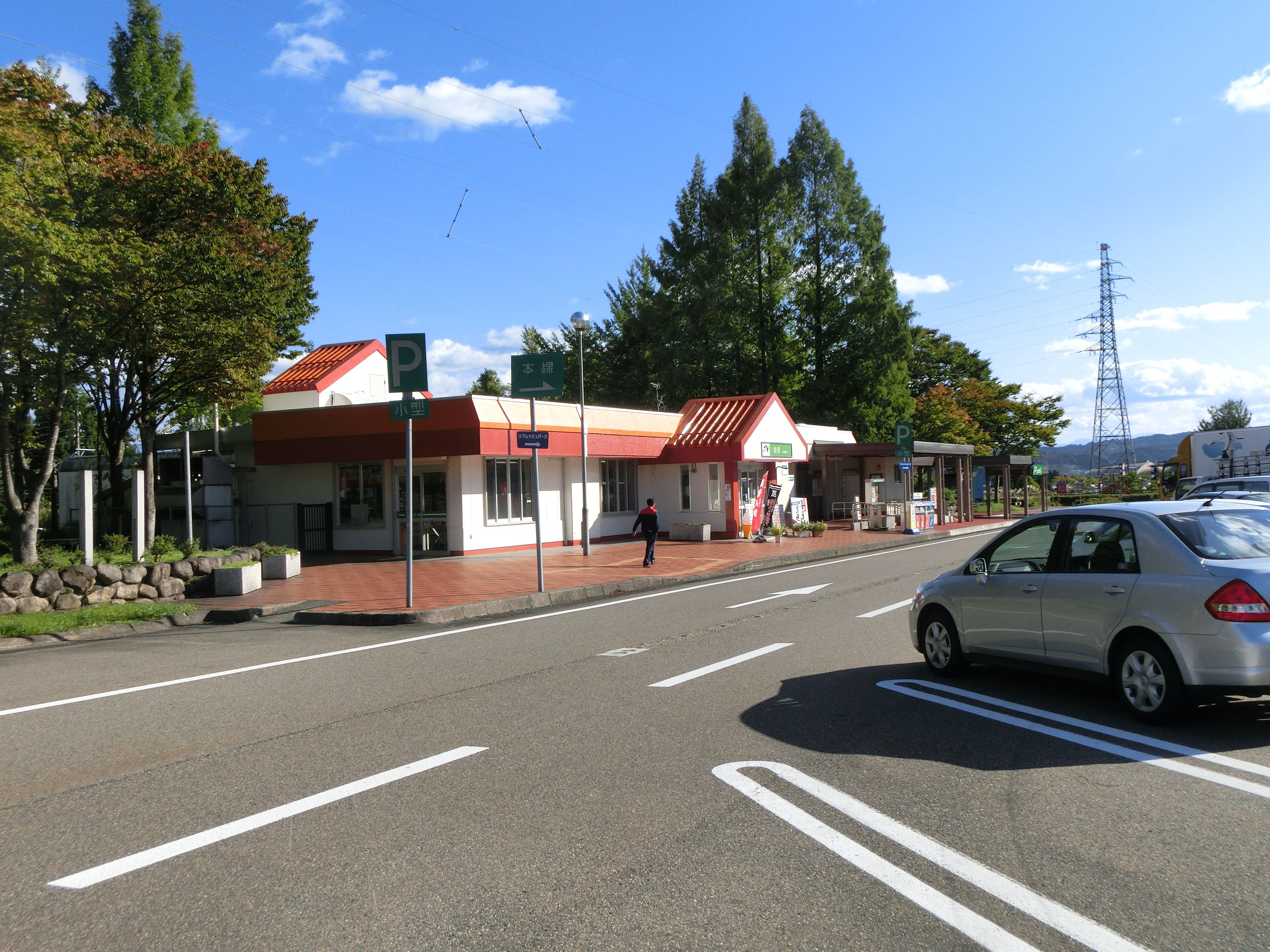 関越自動車道 山谷パーキングエリア（上り線）